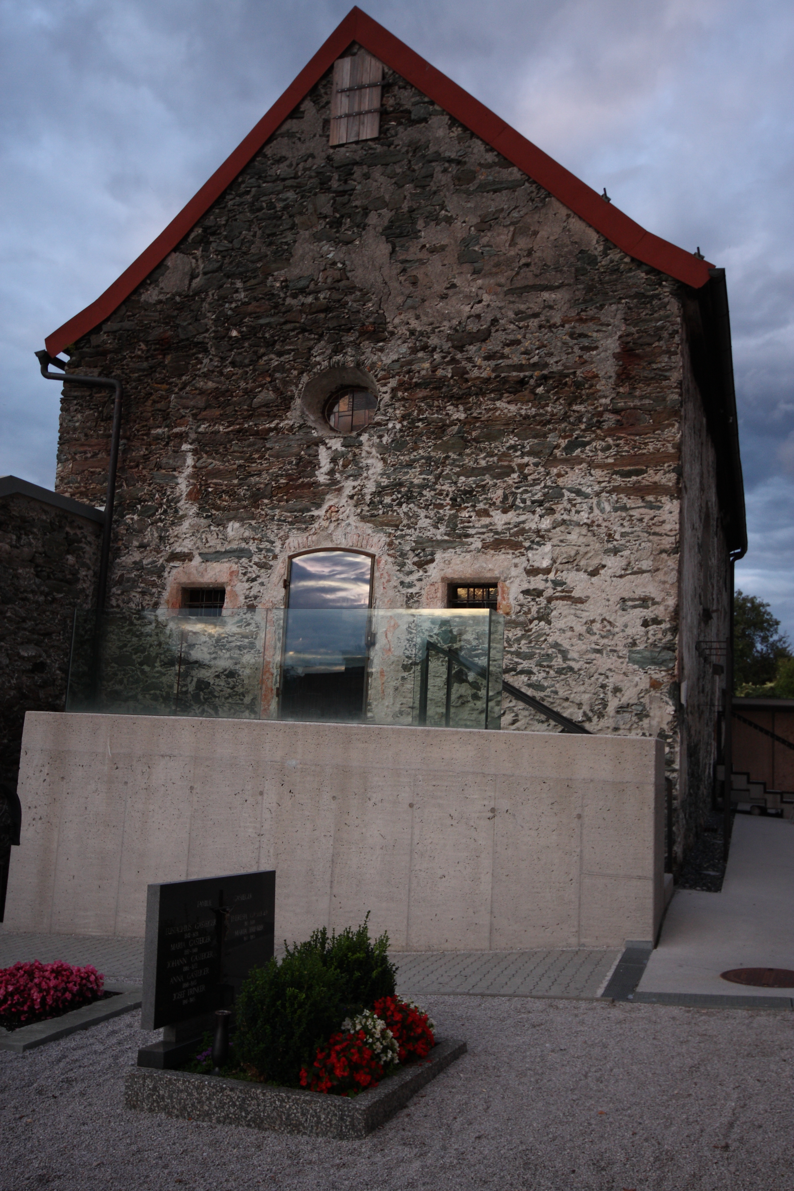 Karner, Annakapelle